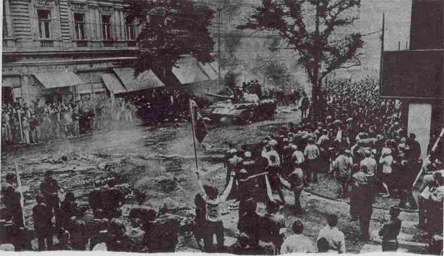 Vista della città.